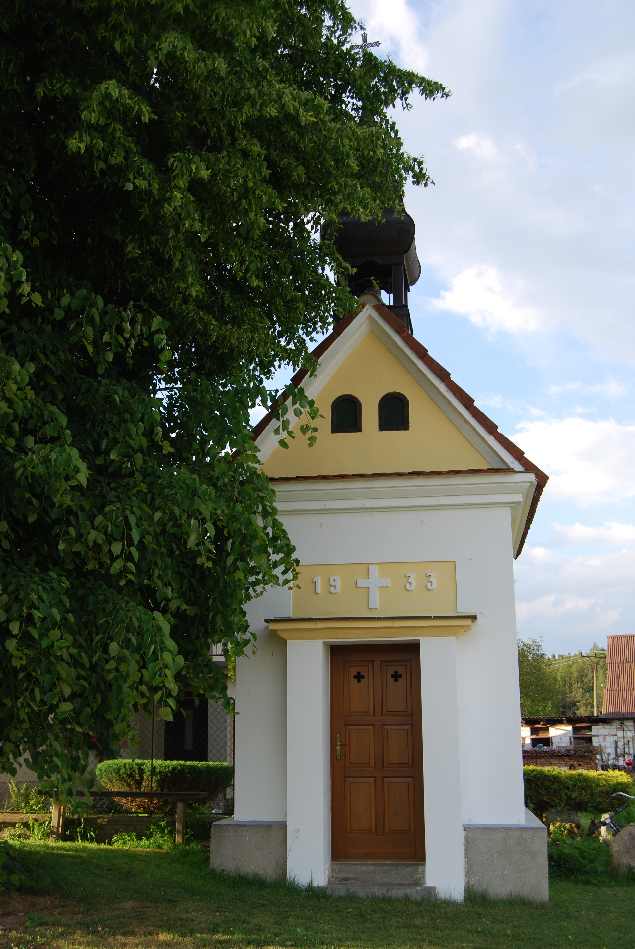 Návesní kaple. Neradov, Lom (místní název) okres Strakonice. Česká republika.